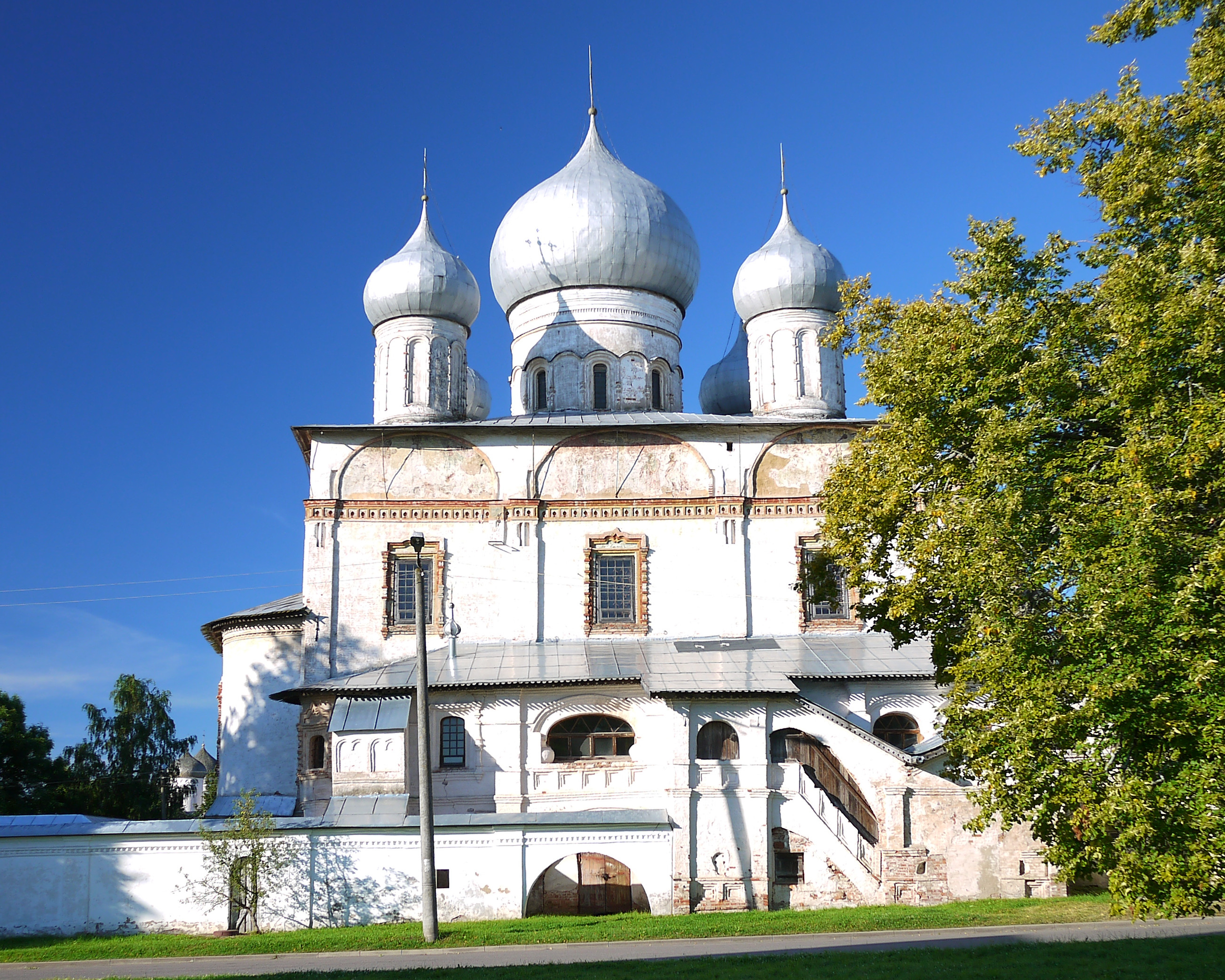 Собор Знаменский (Новгородская область, Великий Новгород, Ильина улица, 26)